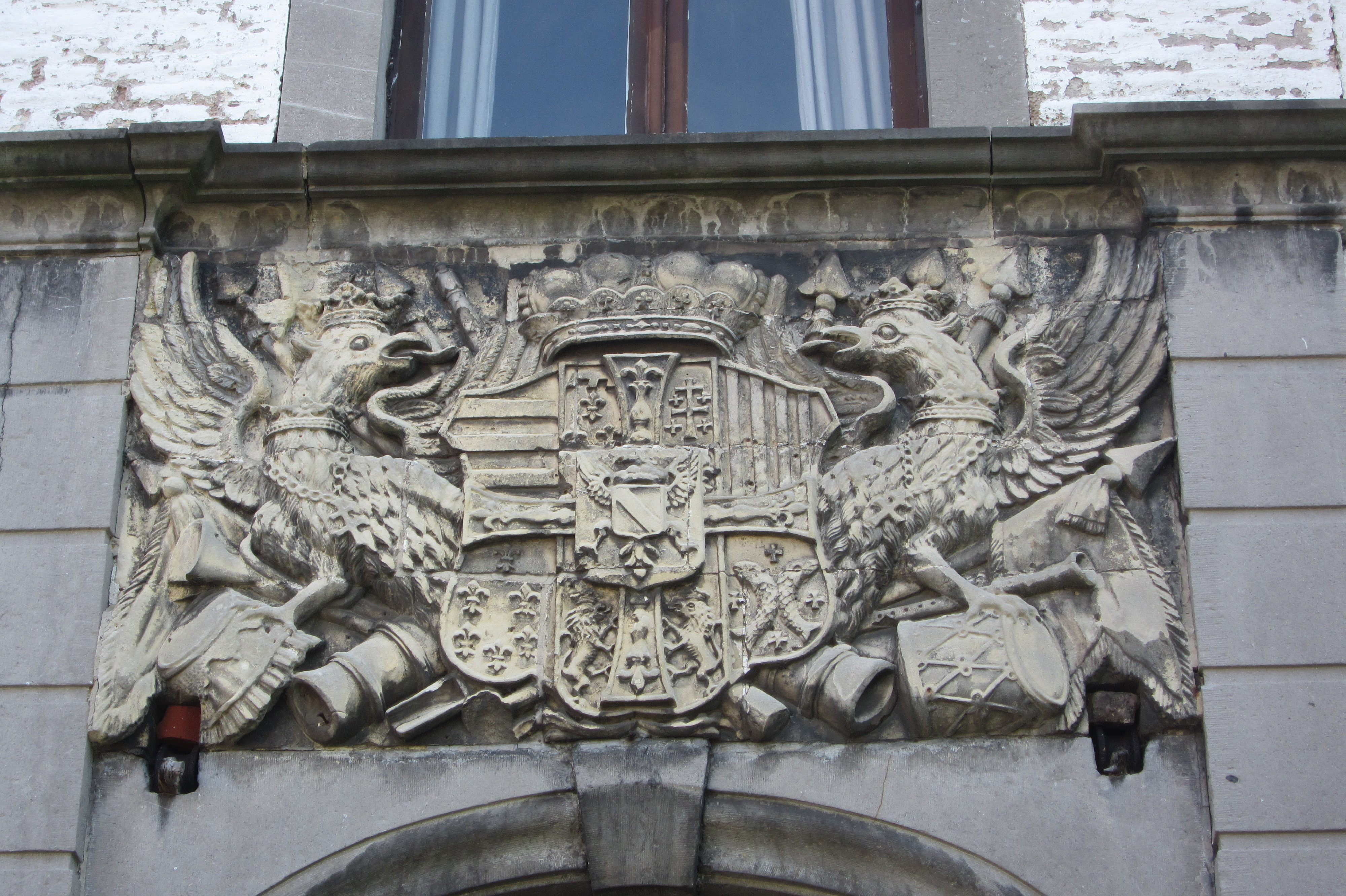 Stenen wapen grootmeester Karel Alexander van Lotharingen boven inkomdeur rentmeesterij Alden Biesen te Diepenbeek